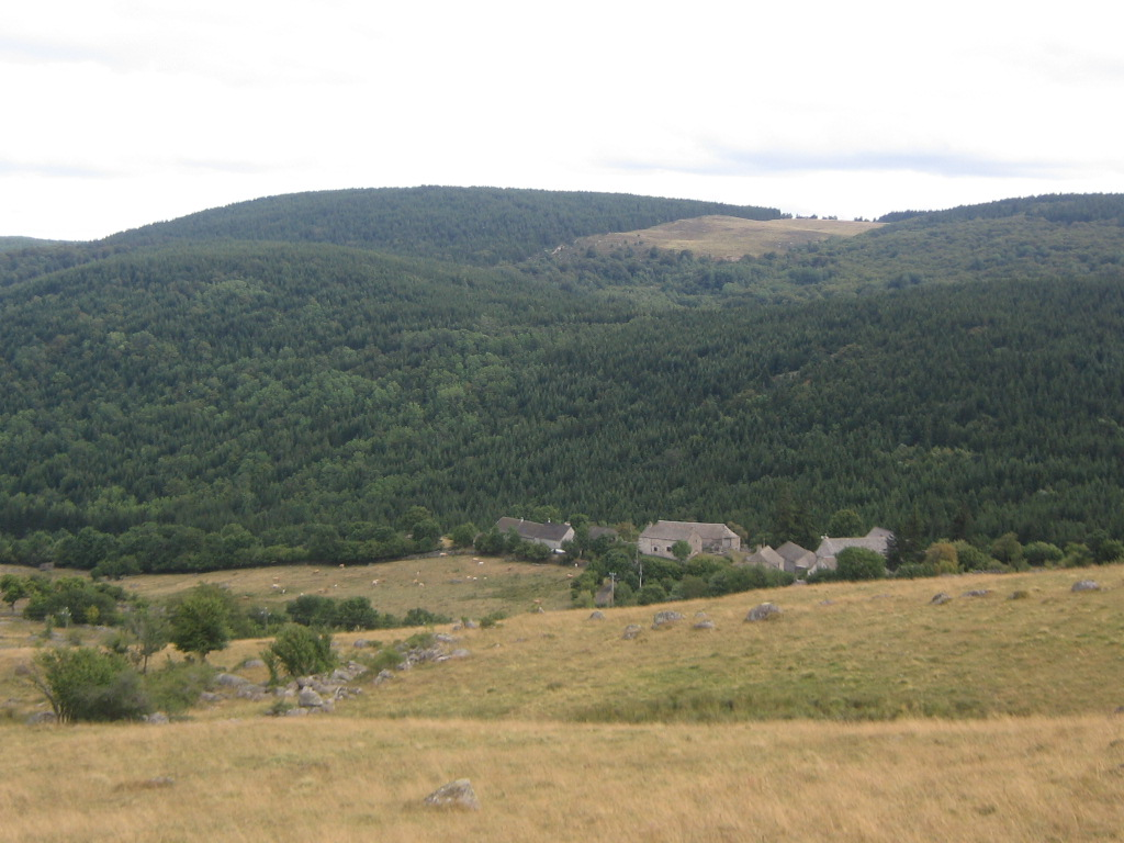 le Mountasset (1374 m) et le village de la Blatte.